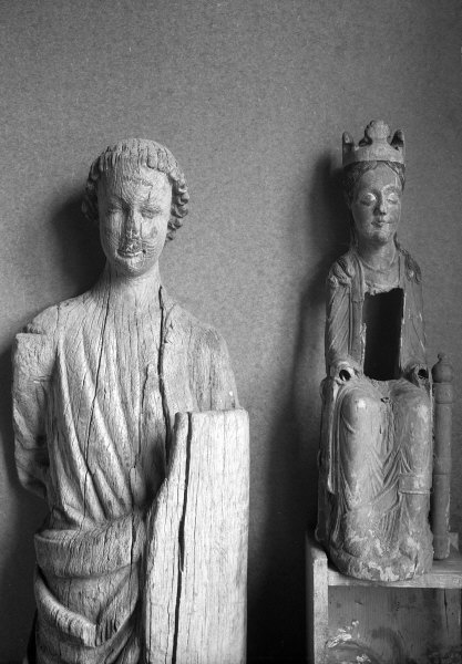 Kyrkogården. Kategori: (01) Exteriörer, detaljerKyrkogården.